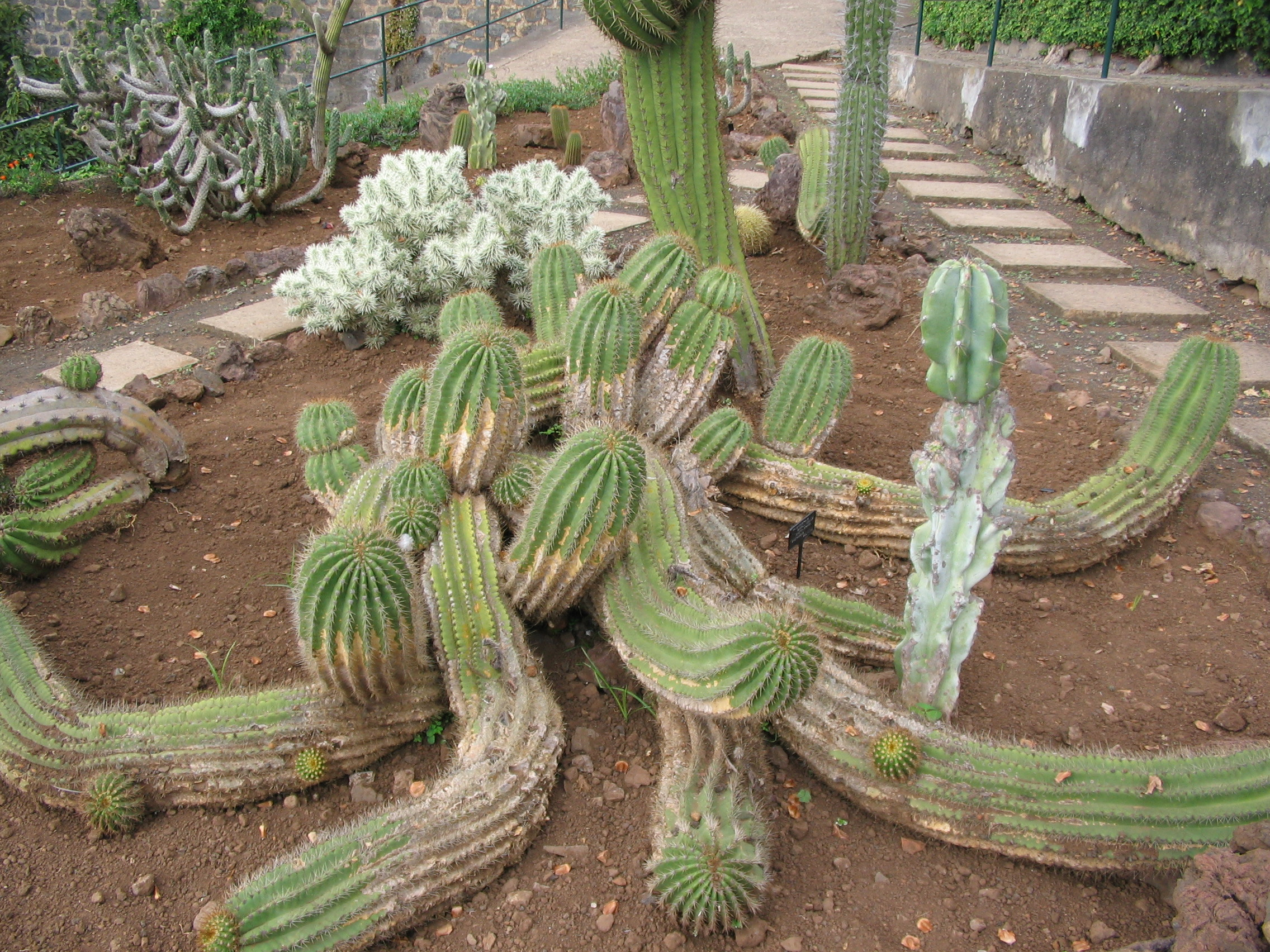 Echinopsis (Trichocereus) scopuliculus (botanikus kert, Funchal)